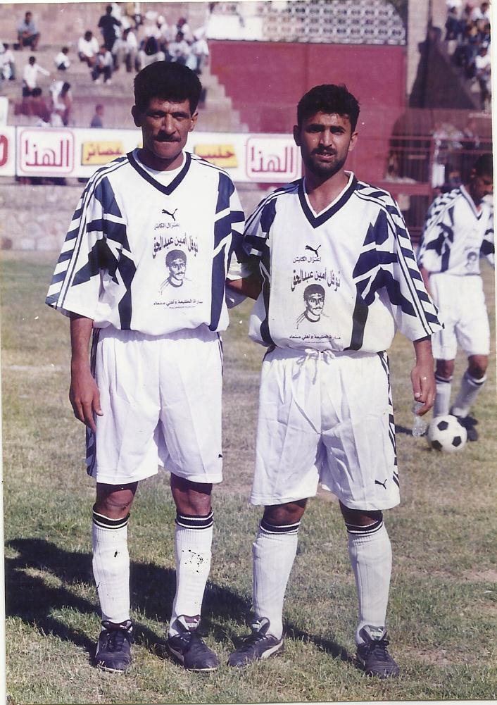 اسعد محمد عبده مع الكابتن نوفل أمين في تعز بيوم اعزاله عام 2000م